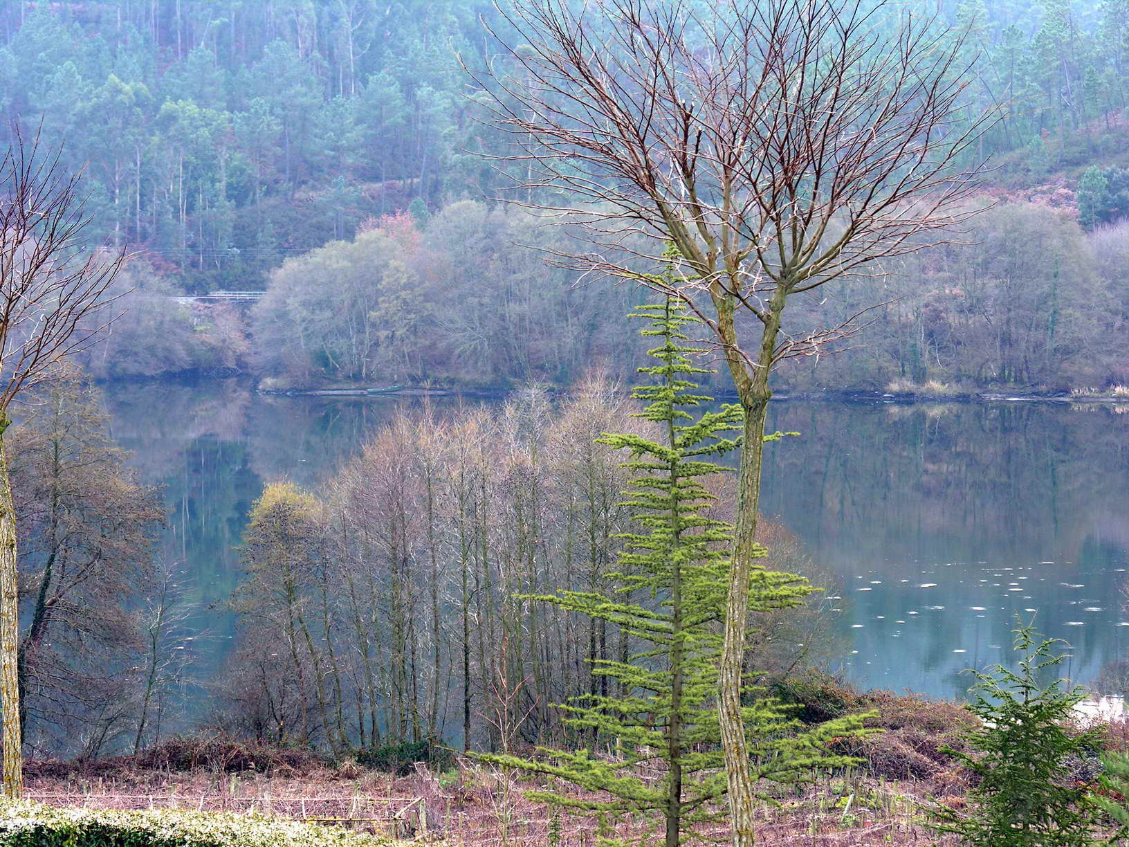 self made. Arnoia - Ribadavia - Ourense - Galicia - Spain